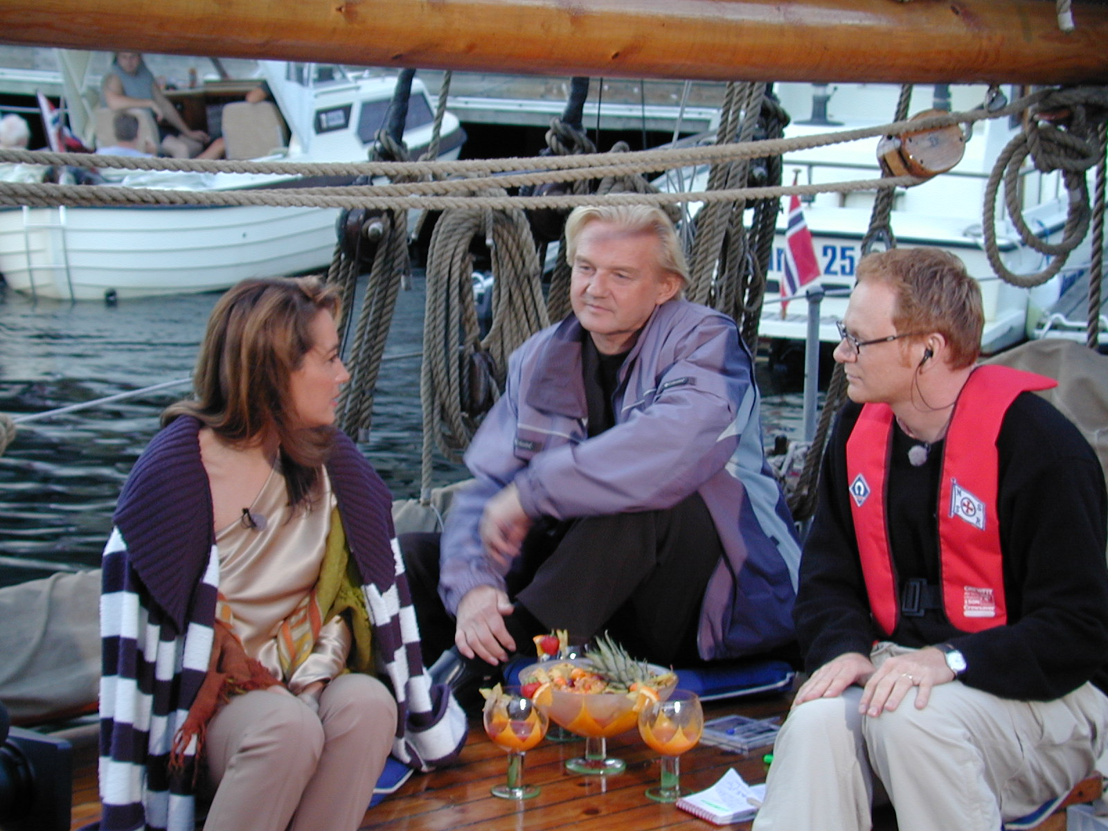 NRK "Sommeråpent" ombord på RS 5 "Liv" 5. juli 2002. På bildet fra høyre Olav Viksmo Slettan og Finn Kalvik